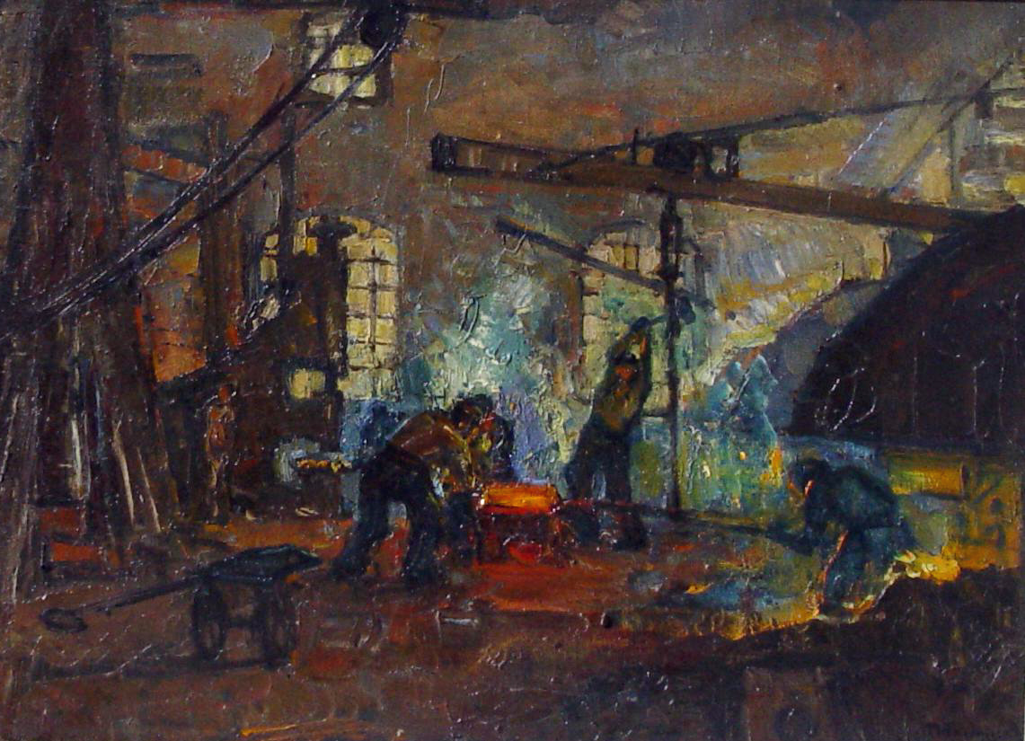 In der Schmiede. Öl auf Leinwand, ca. 47 x 67cm